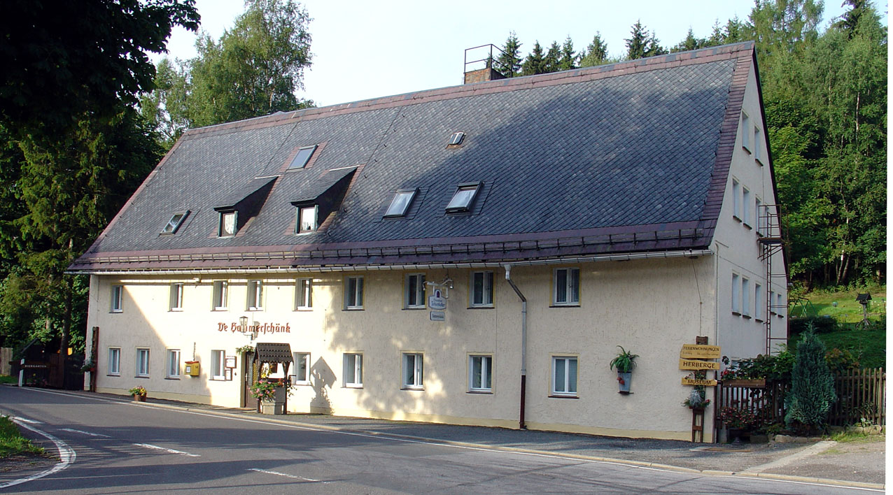 "Hammerschänke" (Kratzhammer-Fürstenwalde), ehemals Teil des bis 1596 betriebenen Hammerwerks "Kratzhammer"(the "hammer-tavern", termed from an old metallurgical plant)